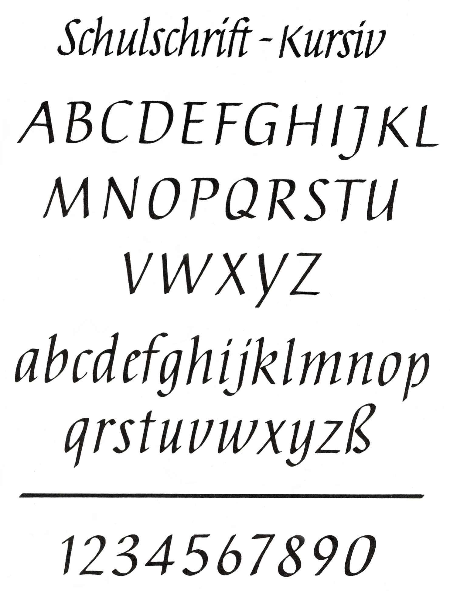 Alphabet der Schulschrift-Kursiv